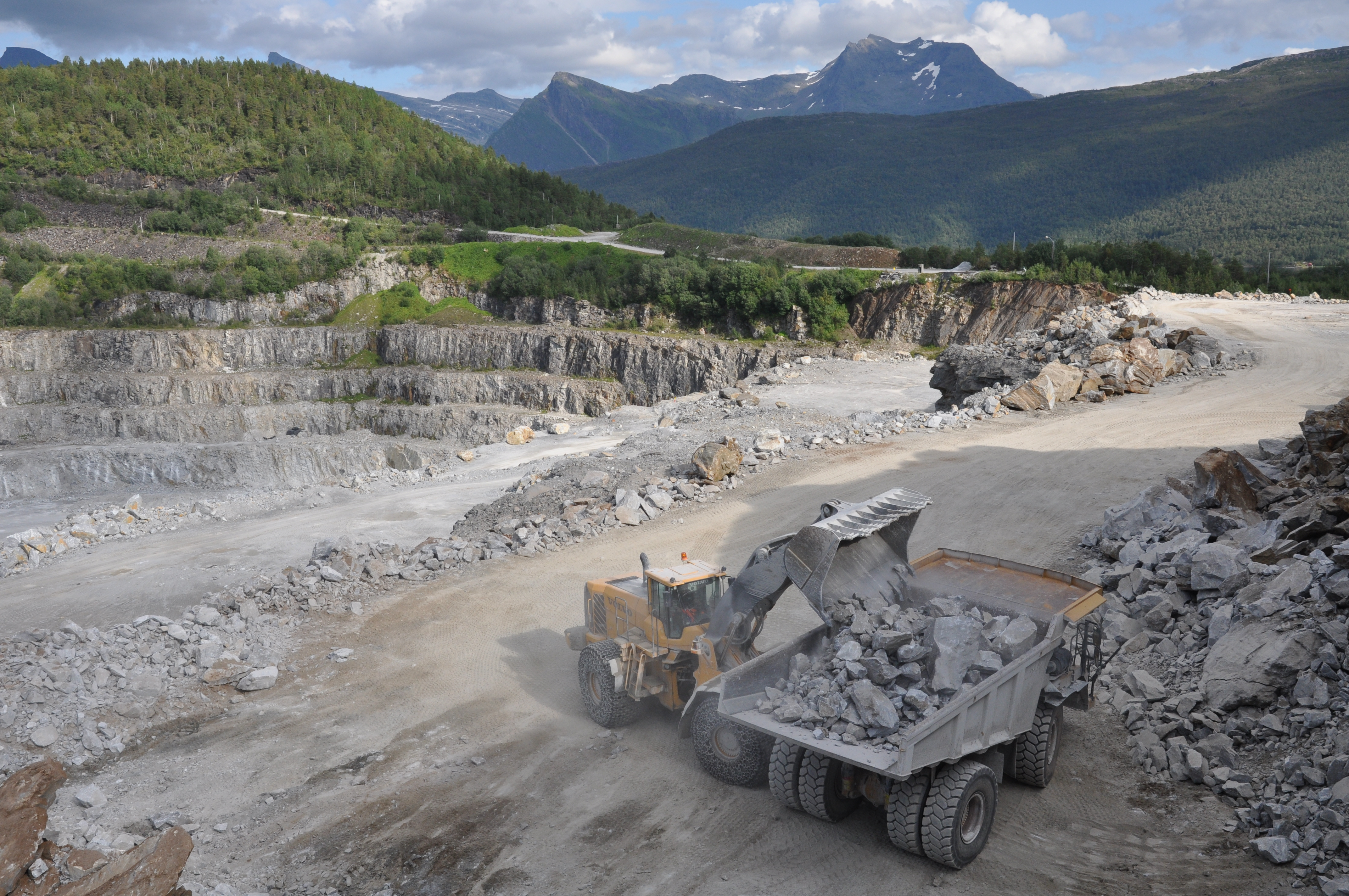 Kalksteinsbrudd ved Norcem Kjøpsvik i Tysfjord, Nordland. Her brytes kalkstein til sementproduksjon.